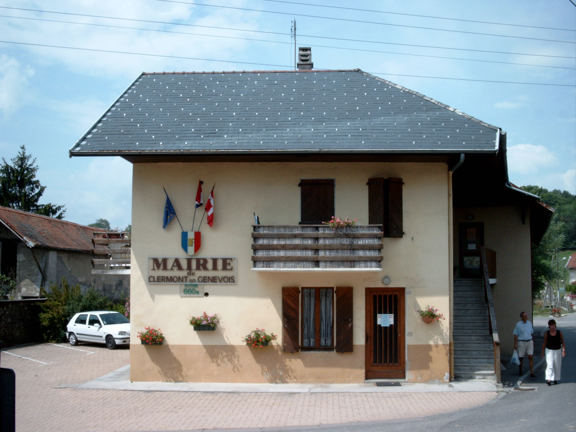 vue de la nouvelle mairie du village de Clermont en Genevois